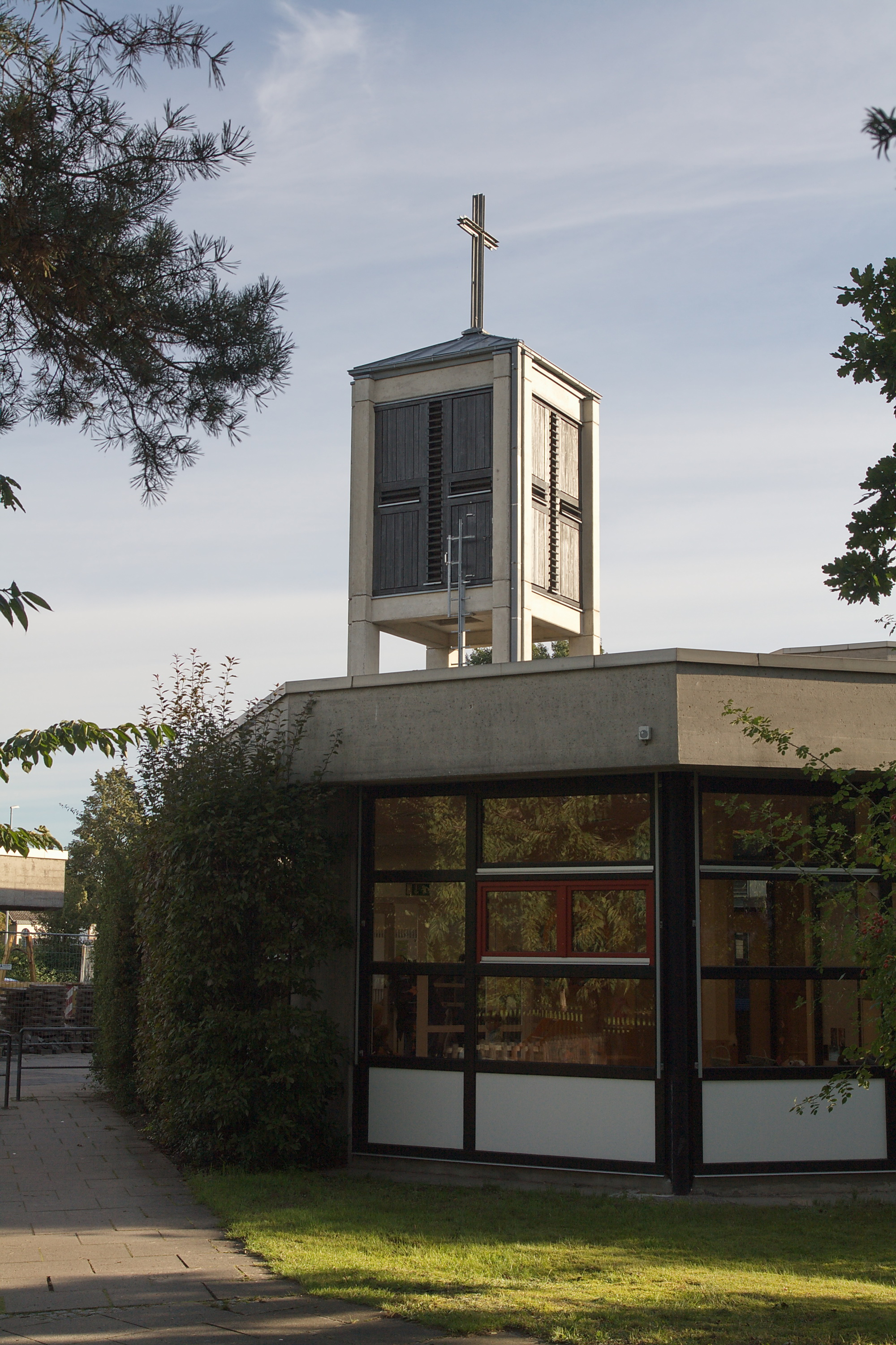 St.Pauluskirche in Burgdorf (Hannover), Niedersachsen, Deutschland.